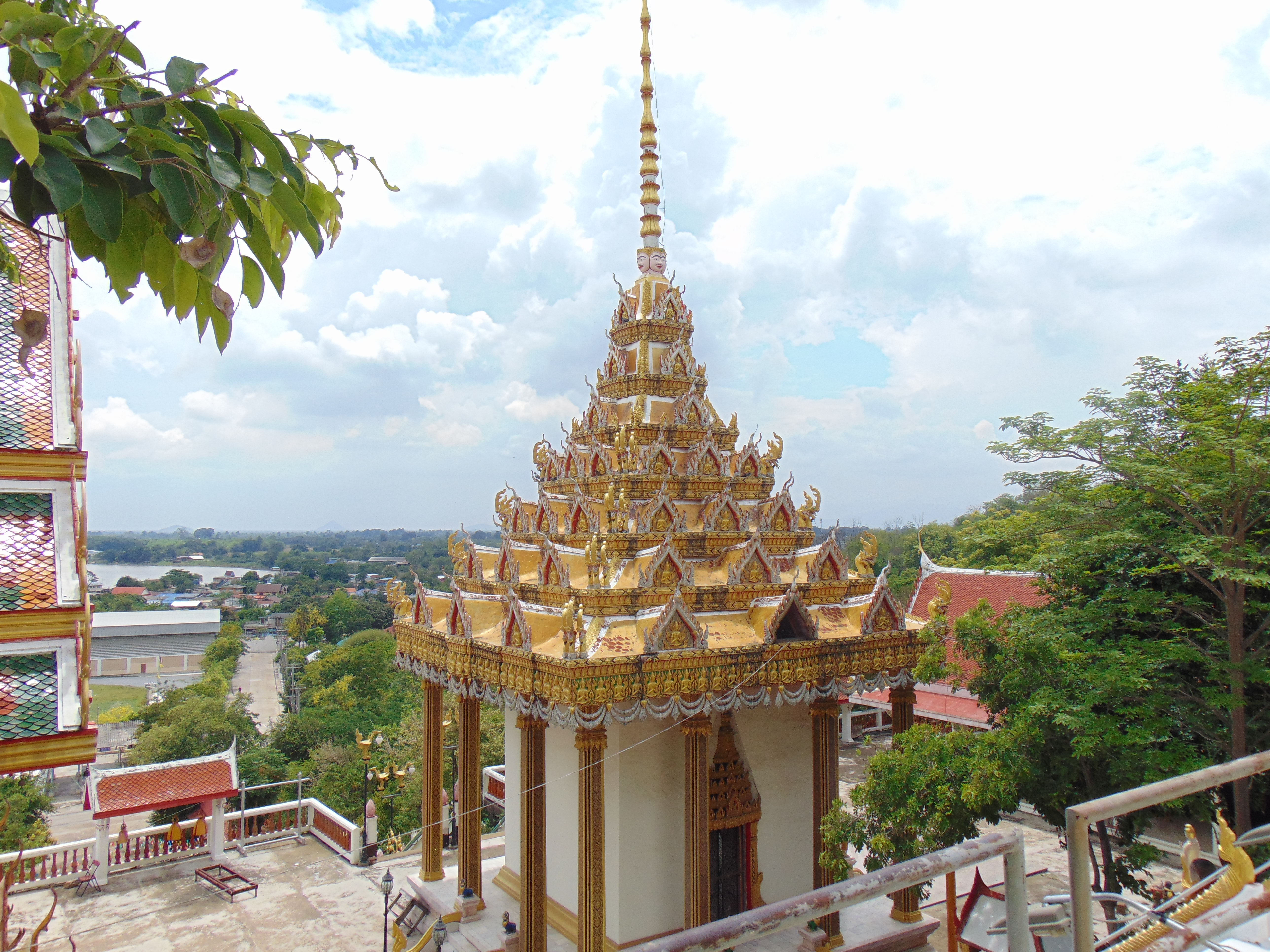 วิหารที่ประดิษฐานรอยพระพุทธบาทจำลอง ณ มณฑปวัดเขาแก้ว